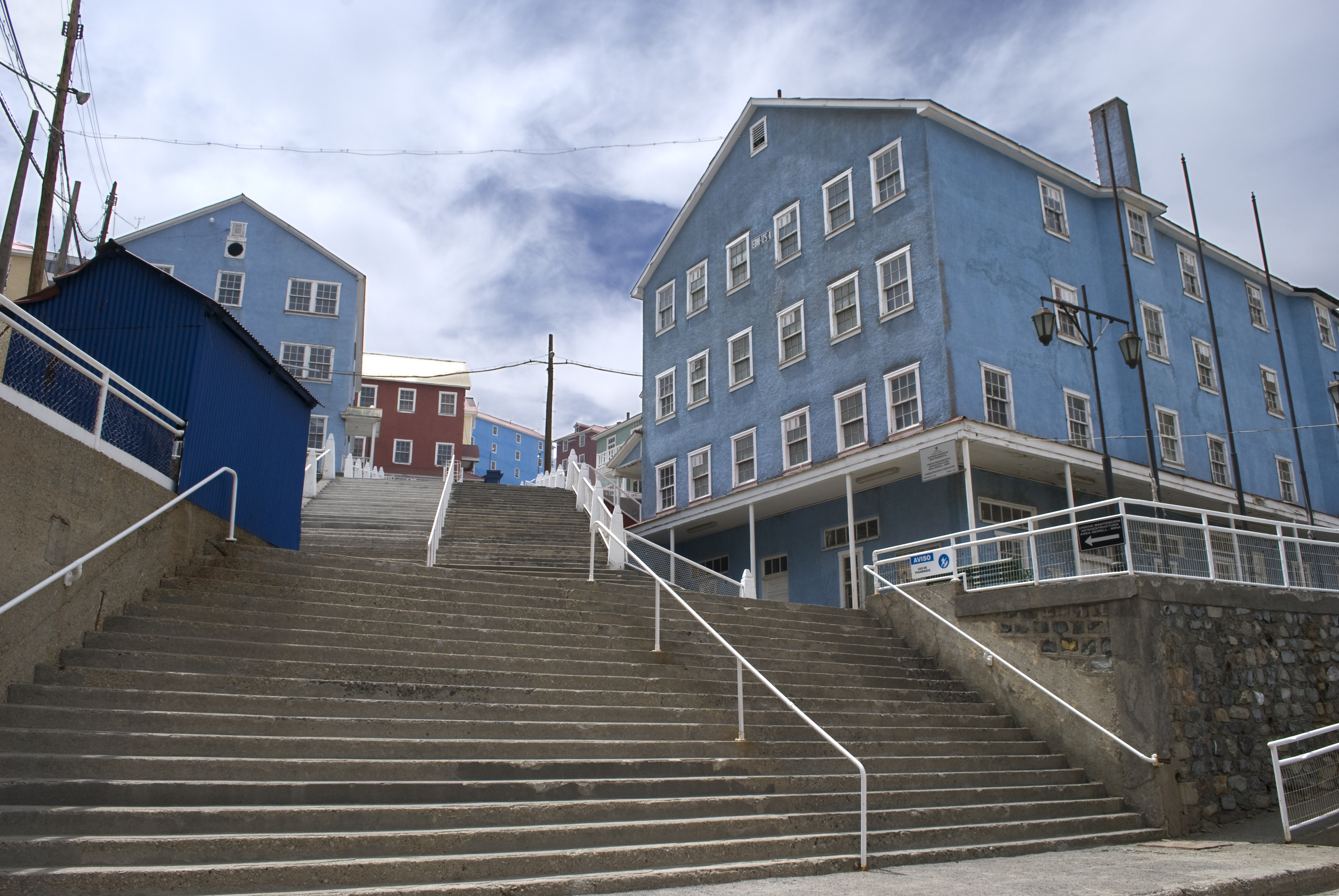 Campamento Sewell This is a photo of a national monument in Chile: 139